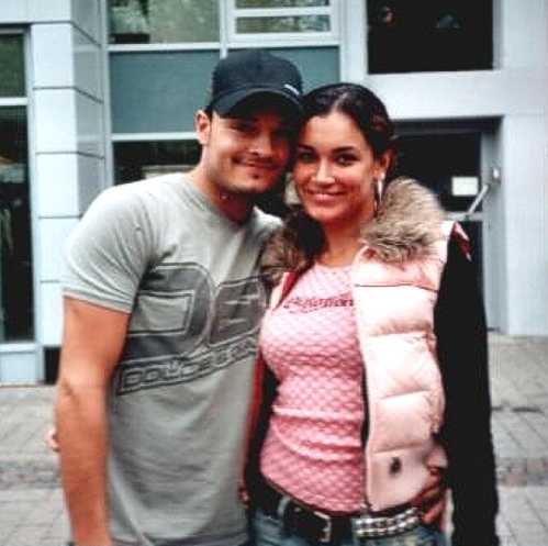 Giovanni Zarrella mit seiner Ehefrau, damals noch Verlobten, Jana Ina in Oldenburg